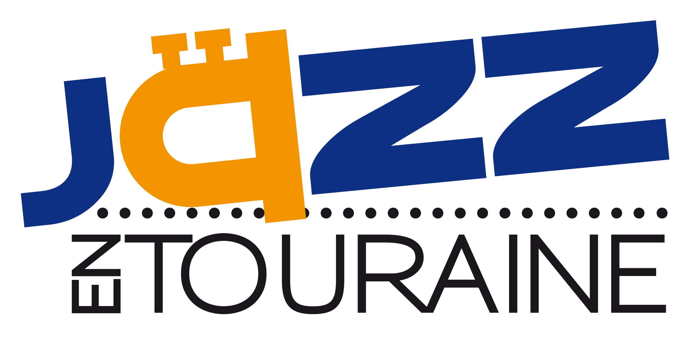 Logo du festival Jazz en Touraine, modifié en 2017 et créer par le graphiste Sylvain Garrigues